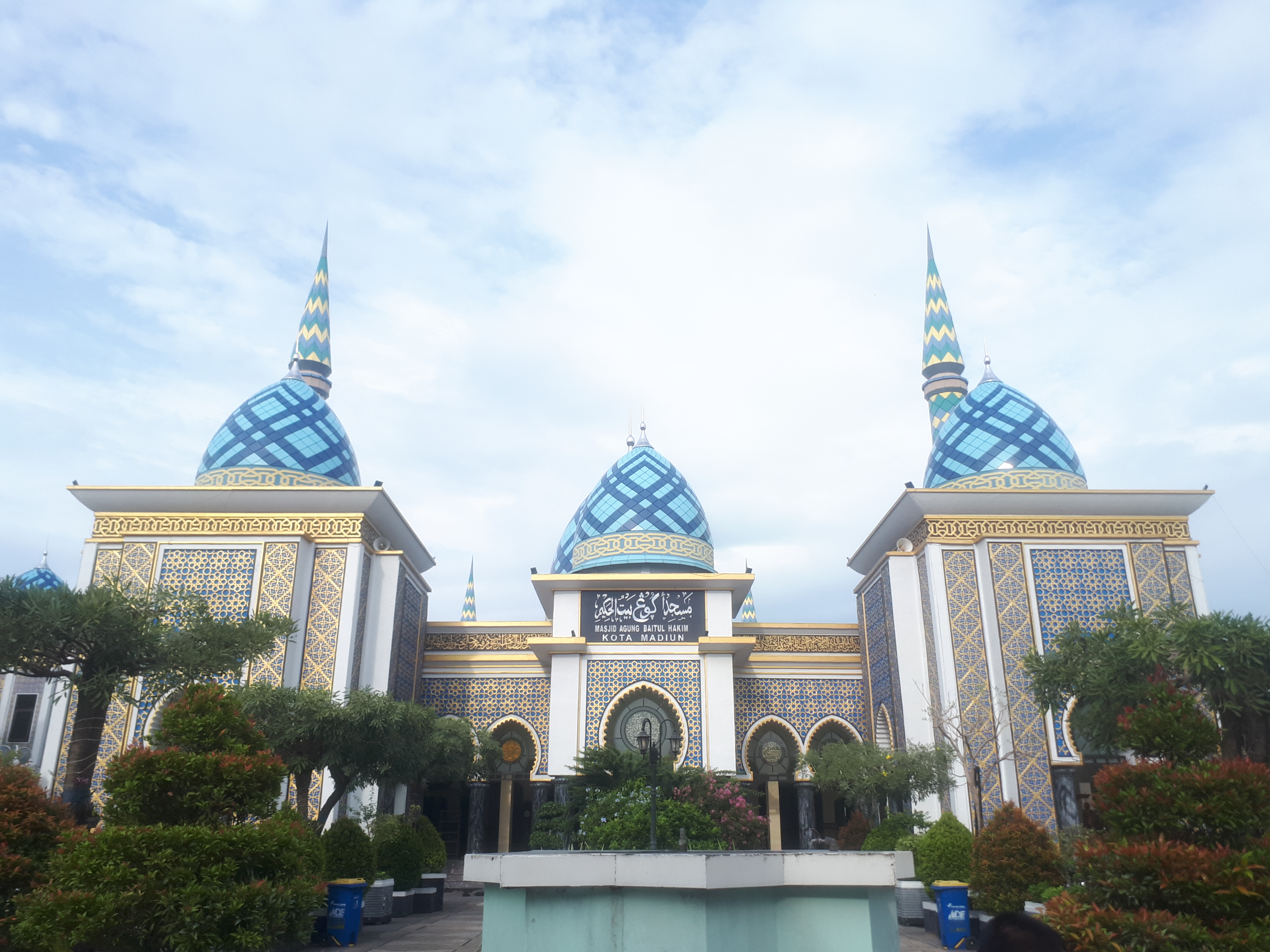 Masjid Baitul Hakim terletak di barat Alun-Alun Kota Madiun